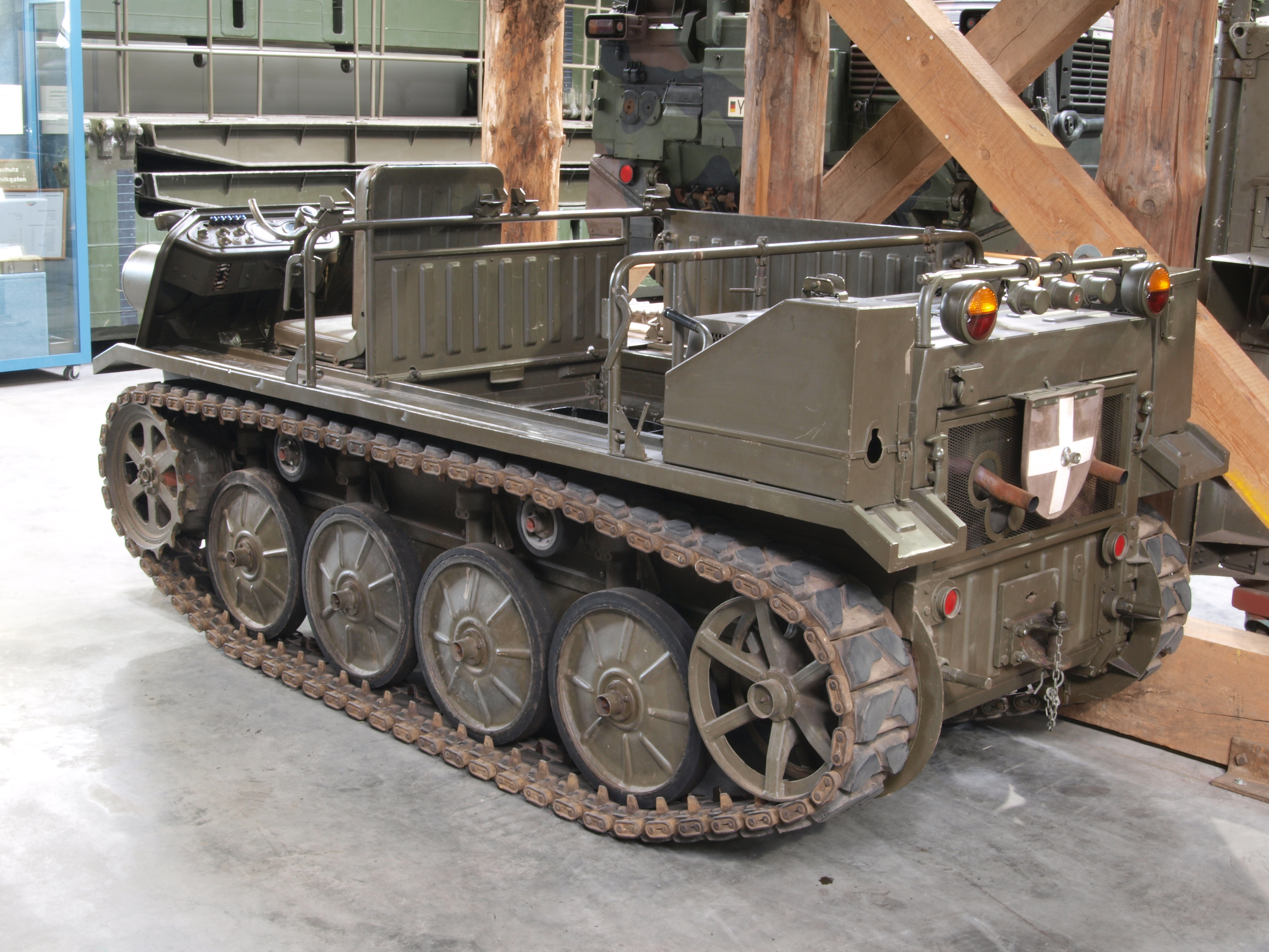 NSU-Werk AG Gebirgskarette